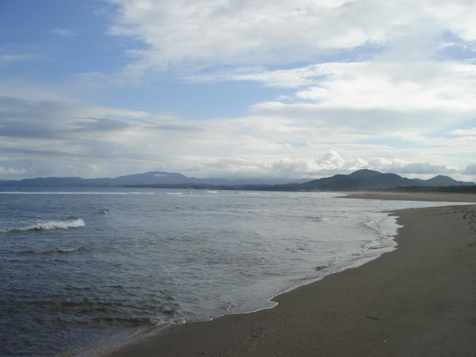 日本の渚百選 入野海岸